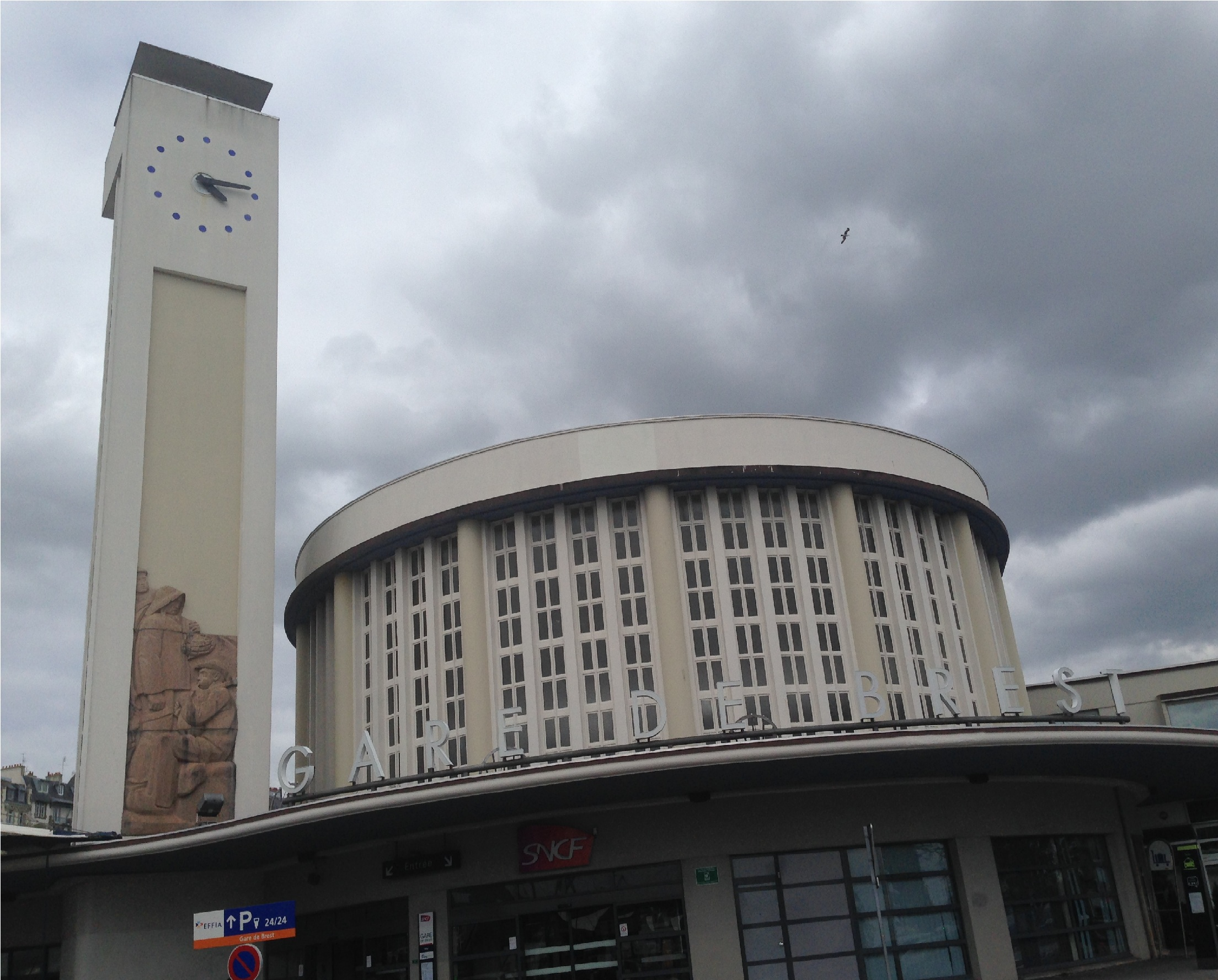 Gare de Brest-2015